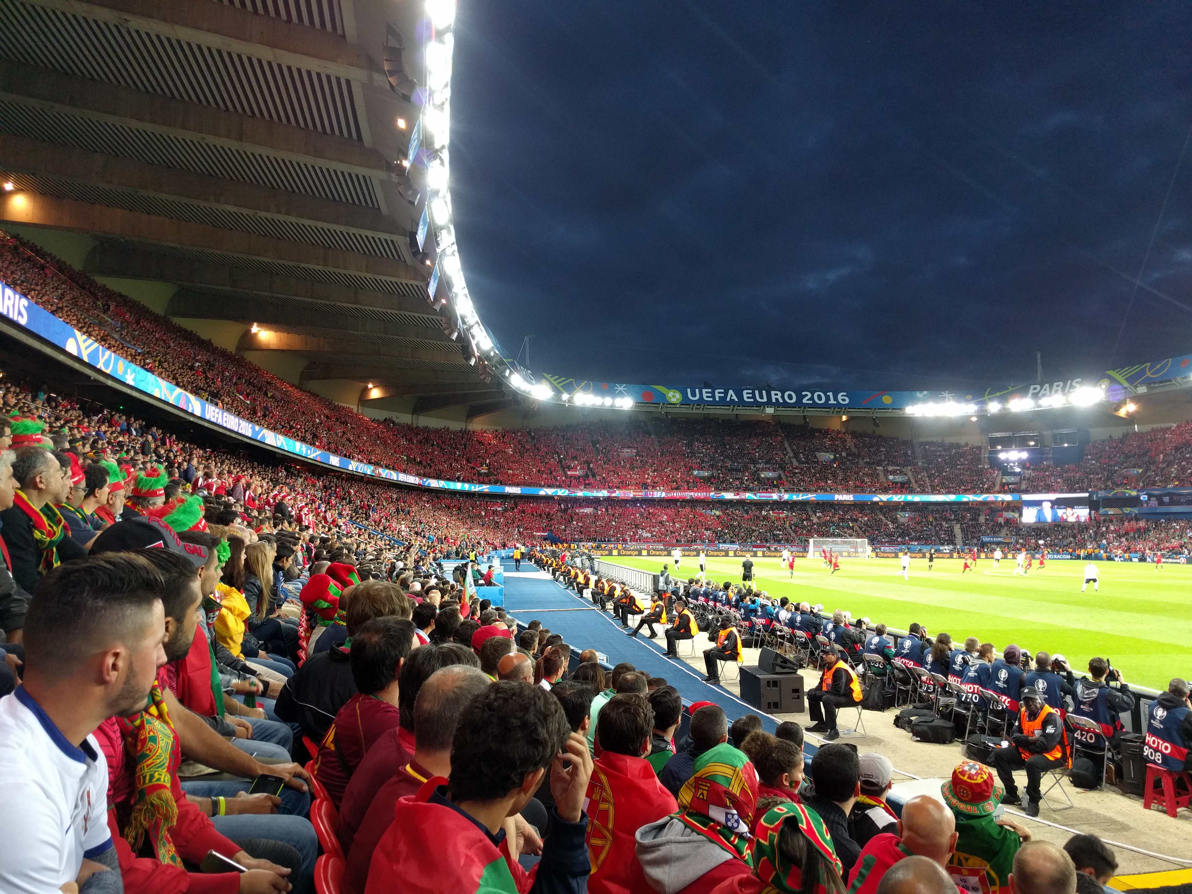 Portugal vs Austria EM2016